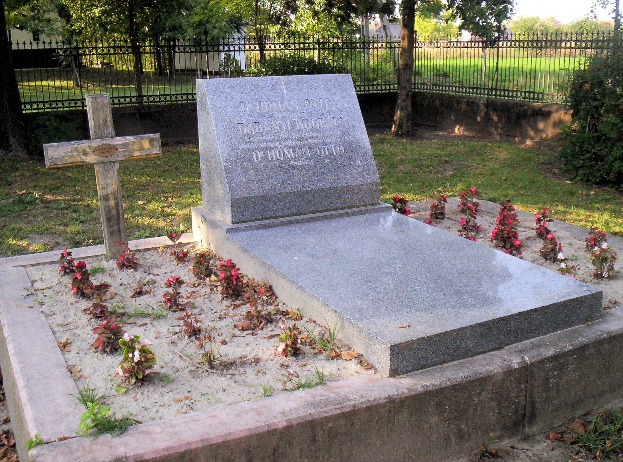 Hóman Bálint sírja Tasson (bal oldali sír)